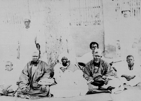 Diobé, chef de Bakel, et ses principaux notables. Campagne de 1887-1888. Collection de 51 photos du Soudan français offerte par le Col. Joseph Galliéni